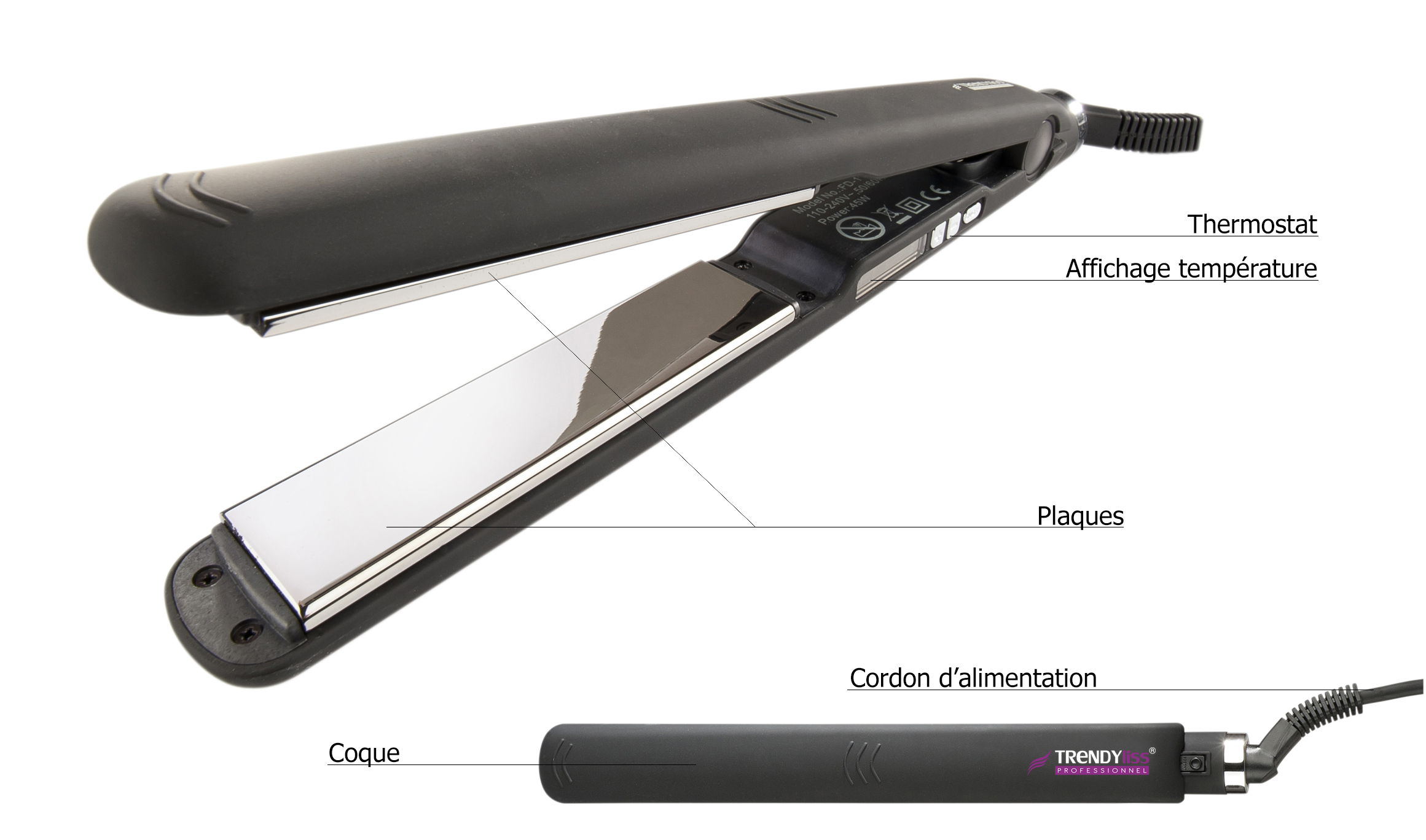 Schéma explicatif d'un fer à lisser